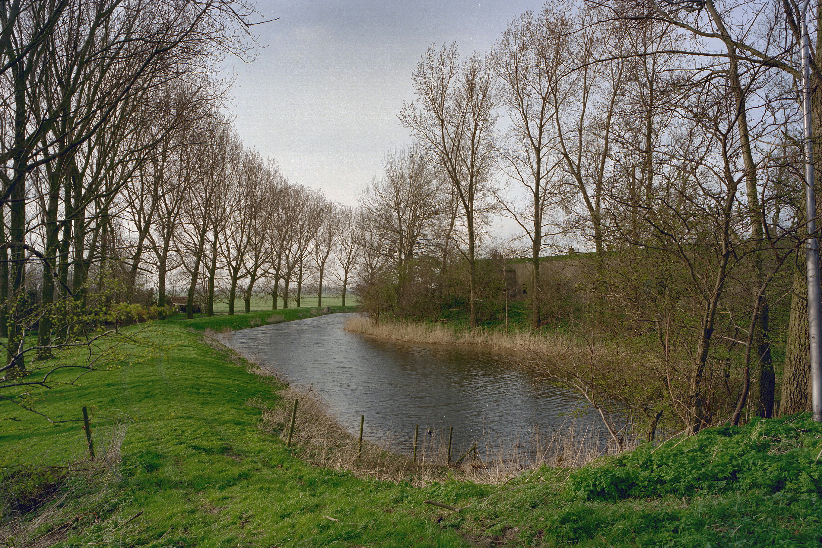 Fort Jisperweg: Fort met gracht en begroeiing (opmerking: Werelderfgoed Beemster)